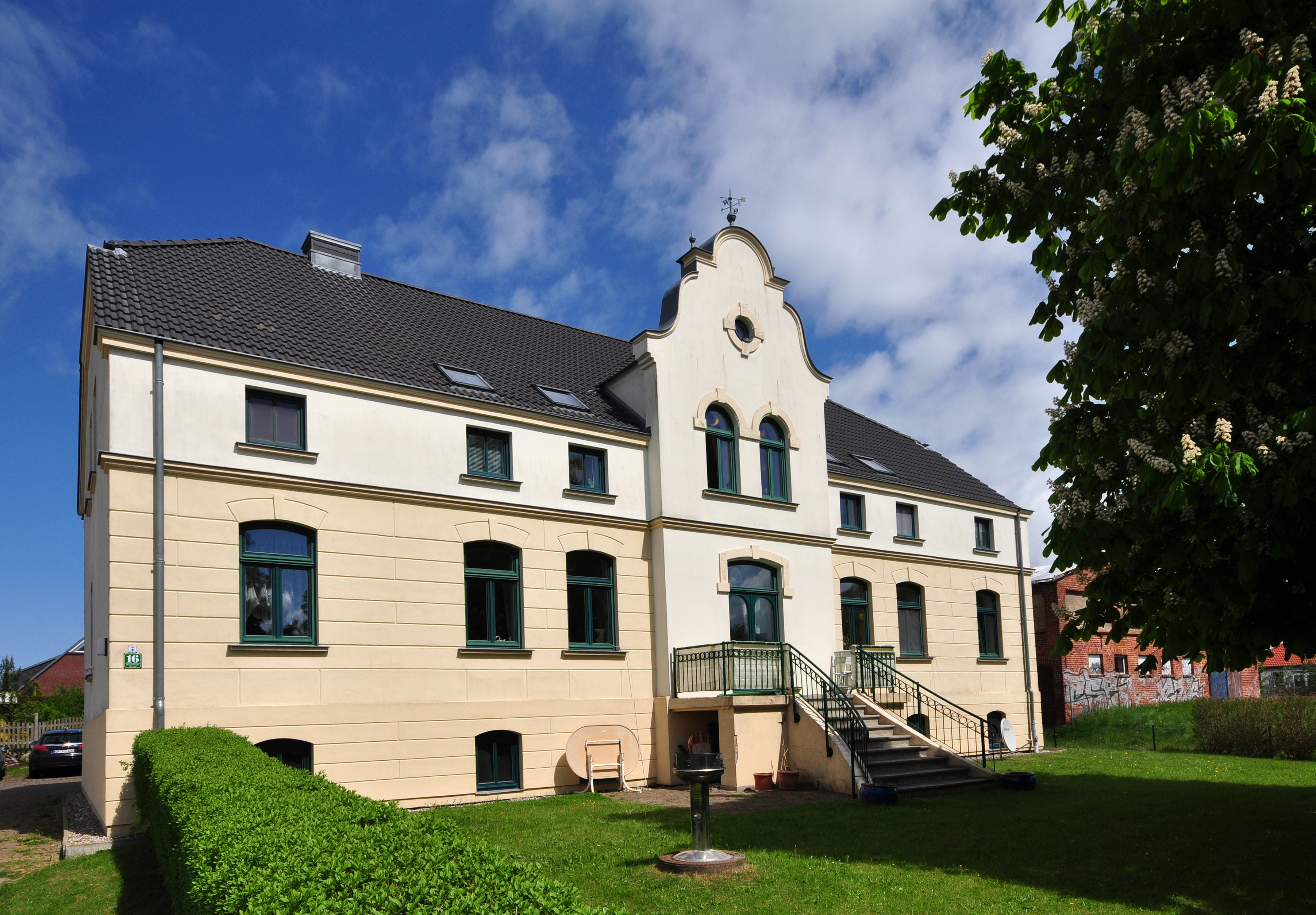 historic building in Bargeshagen, Hauptstraße 16